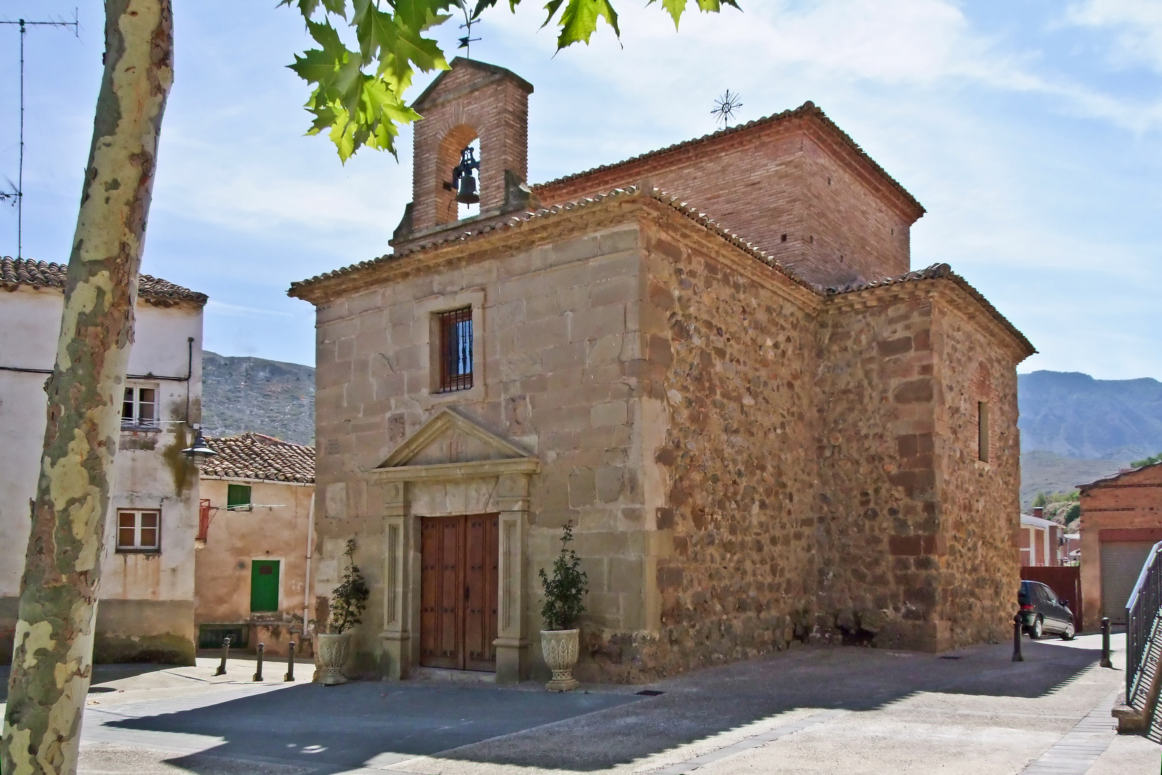 Ermita de la Virgen de la Cuesta en la localidad de Ribafrecha, La Rioja - España